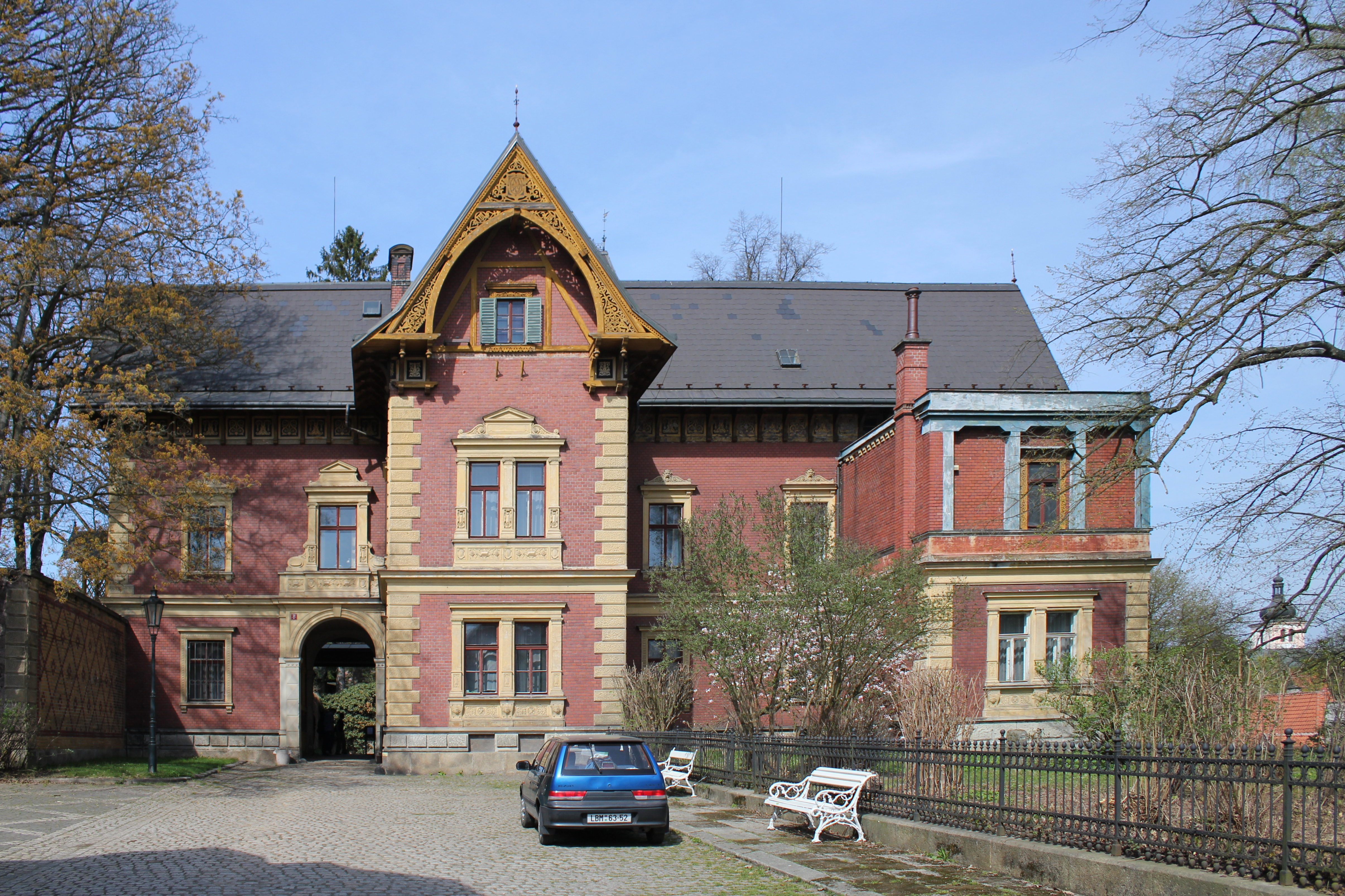 Blaschkeho vila, sídlo muzea